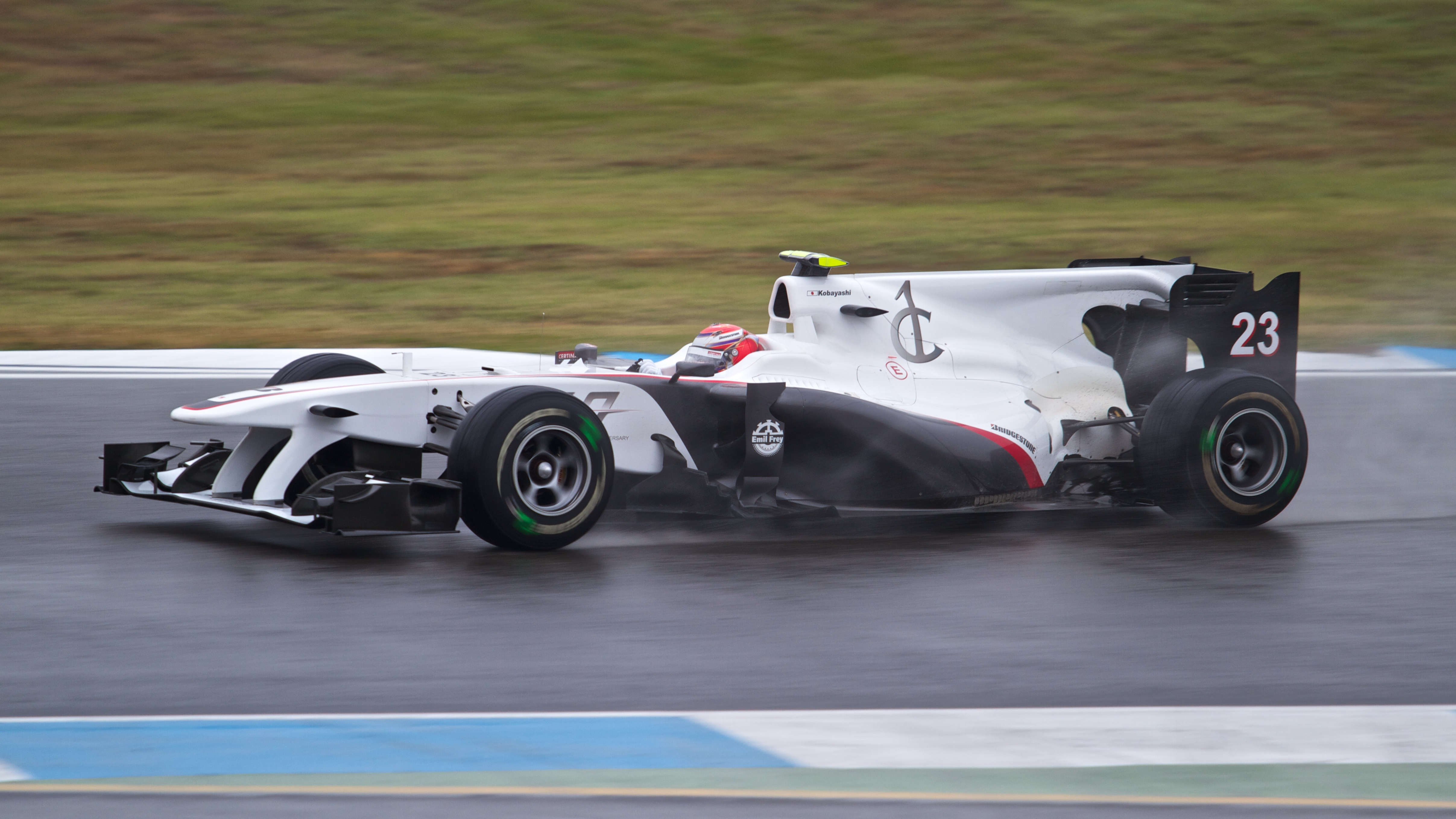 Kamui Kobayashi à Hockenheim en 2010